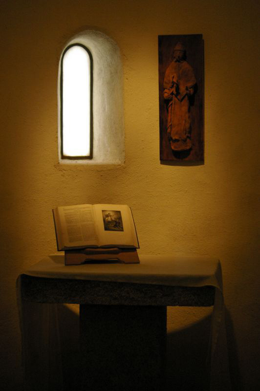 Interior del Convento de San Antonio en La Cabrera (Madrid)